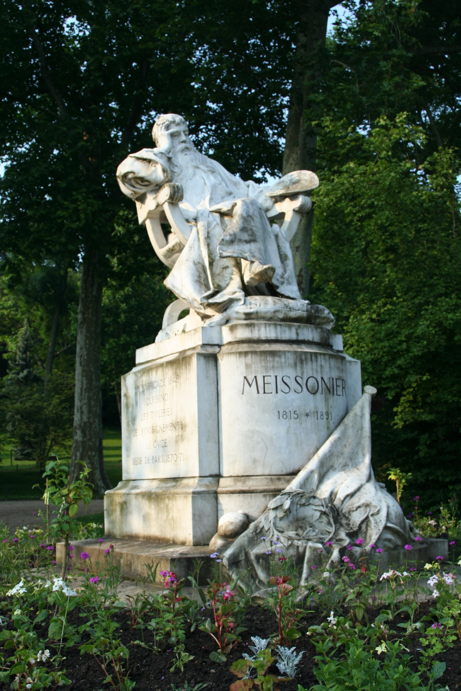 Statue d'Ernest Meissonier à Poissy - Yvelines (France)